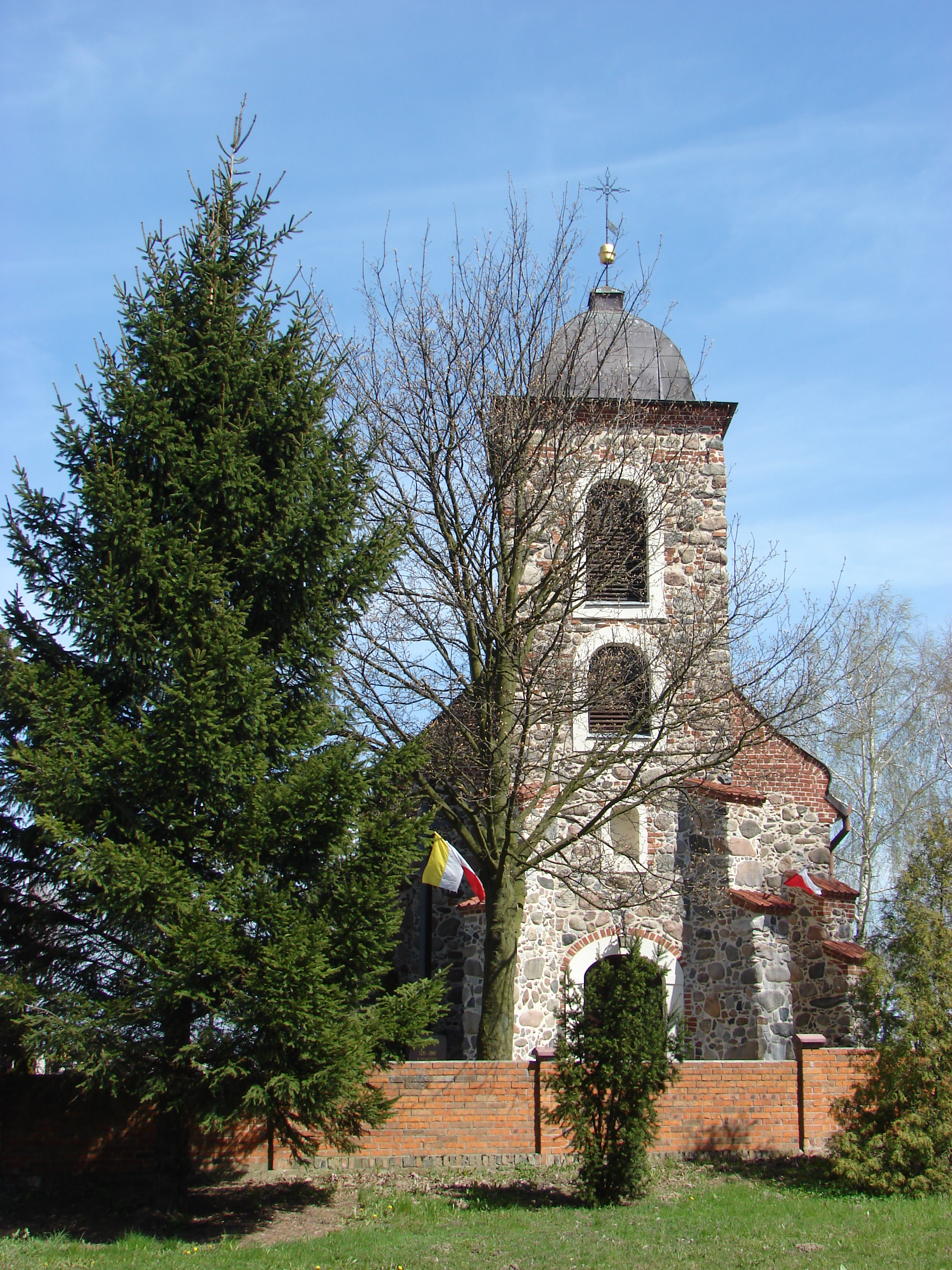 Biskupice, Gmina Łubianka, Toruń County, Kuyavian-Pomeranian Voivodeship. Parish church of St Mary Magdalene, built 1760–1764.